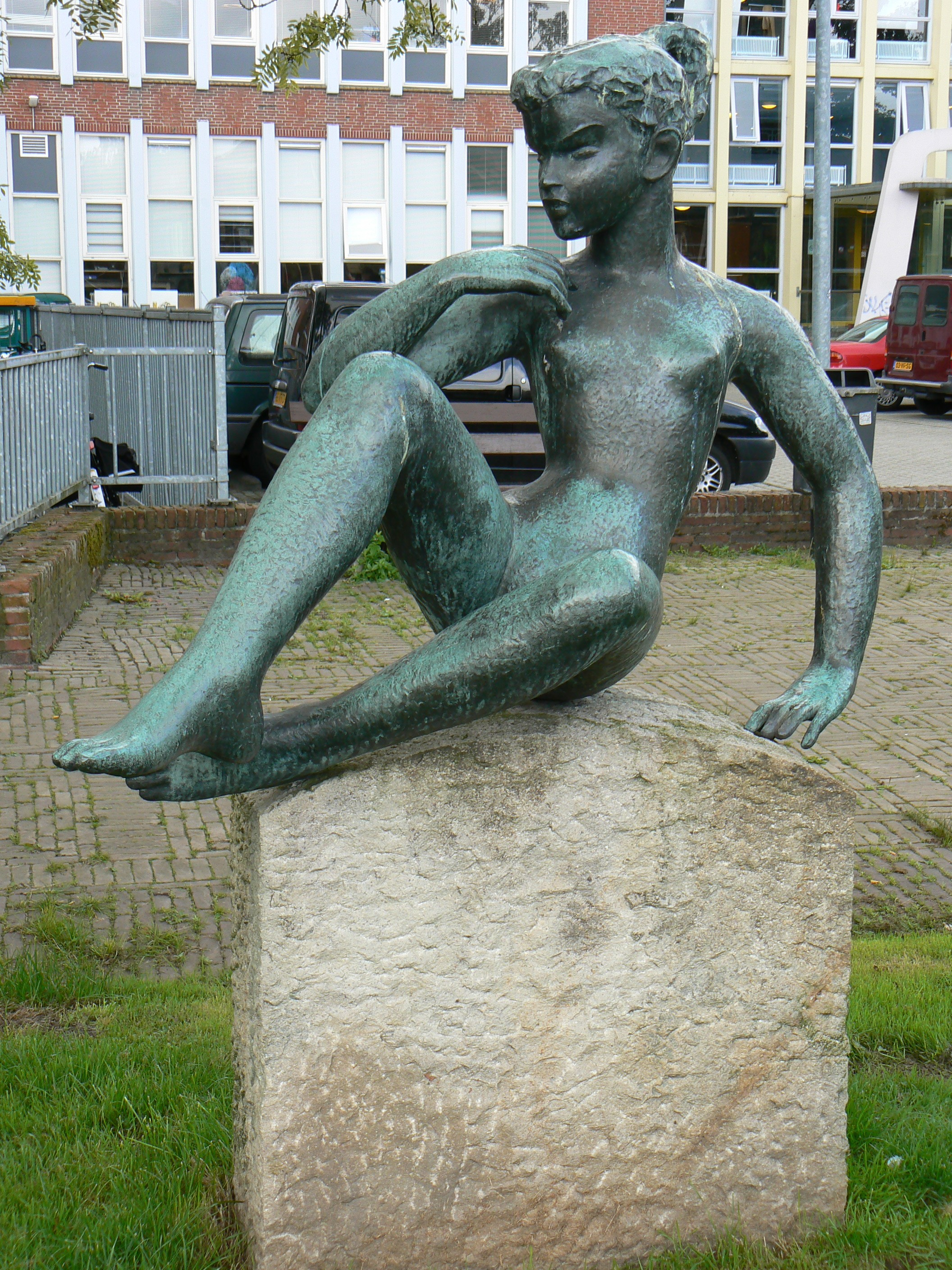 sculpture Denkstertje (1962) by Wladimir de Vries in Groningen/The Netherlands